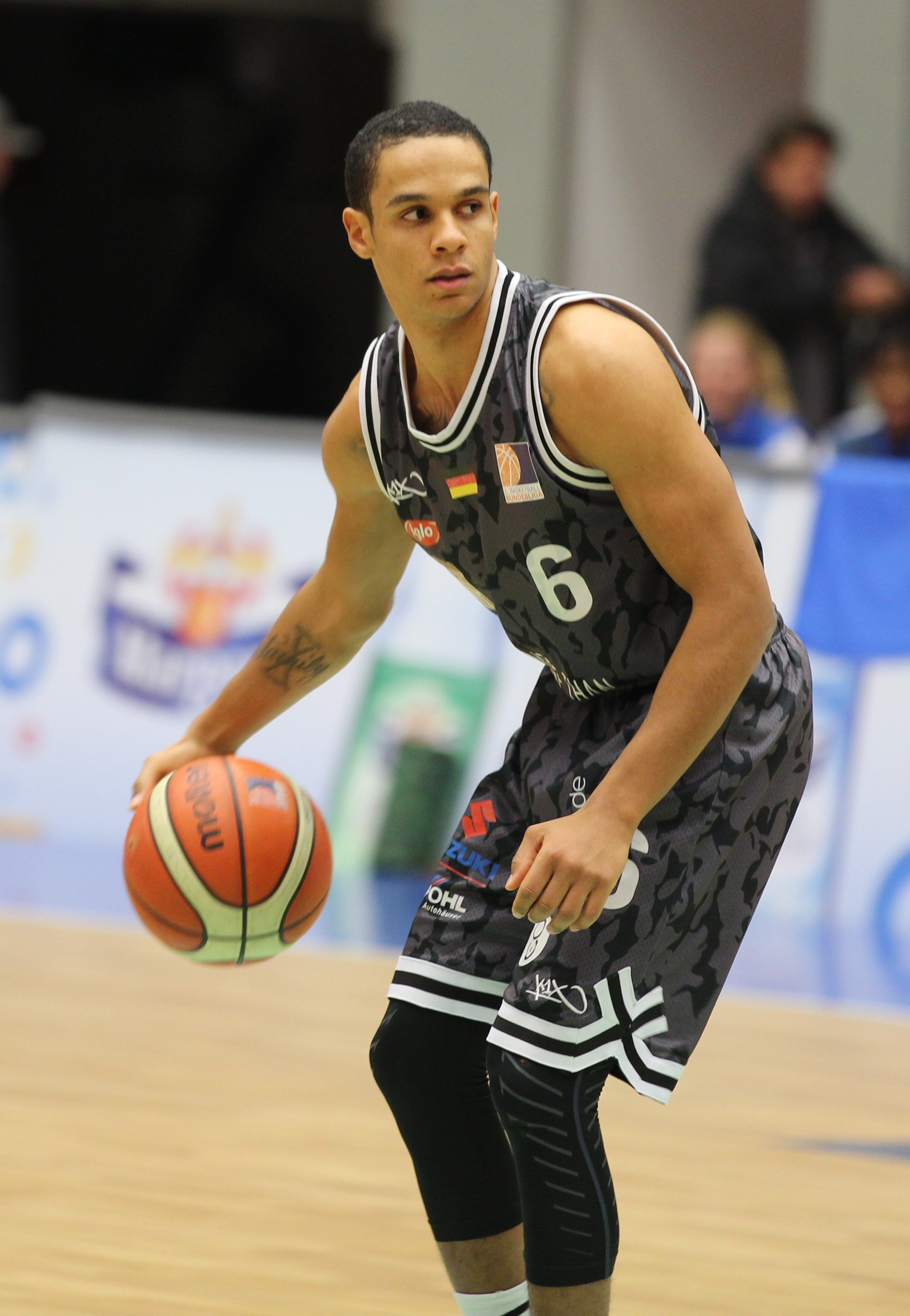 Anthony Canty, Hamburg Towers, Nr. 6